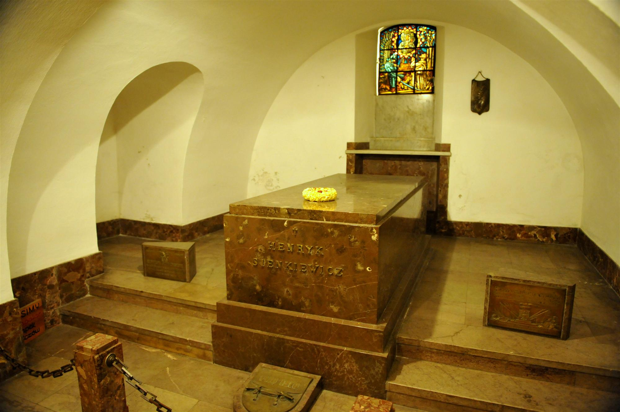 Miejsce ostatniego spoczynku Henryka Sienkiewicza w Bazylice Archikatedralnej Św. Jana Chrzciciela w Warszawie